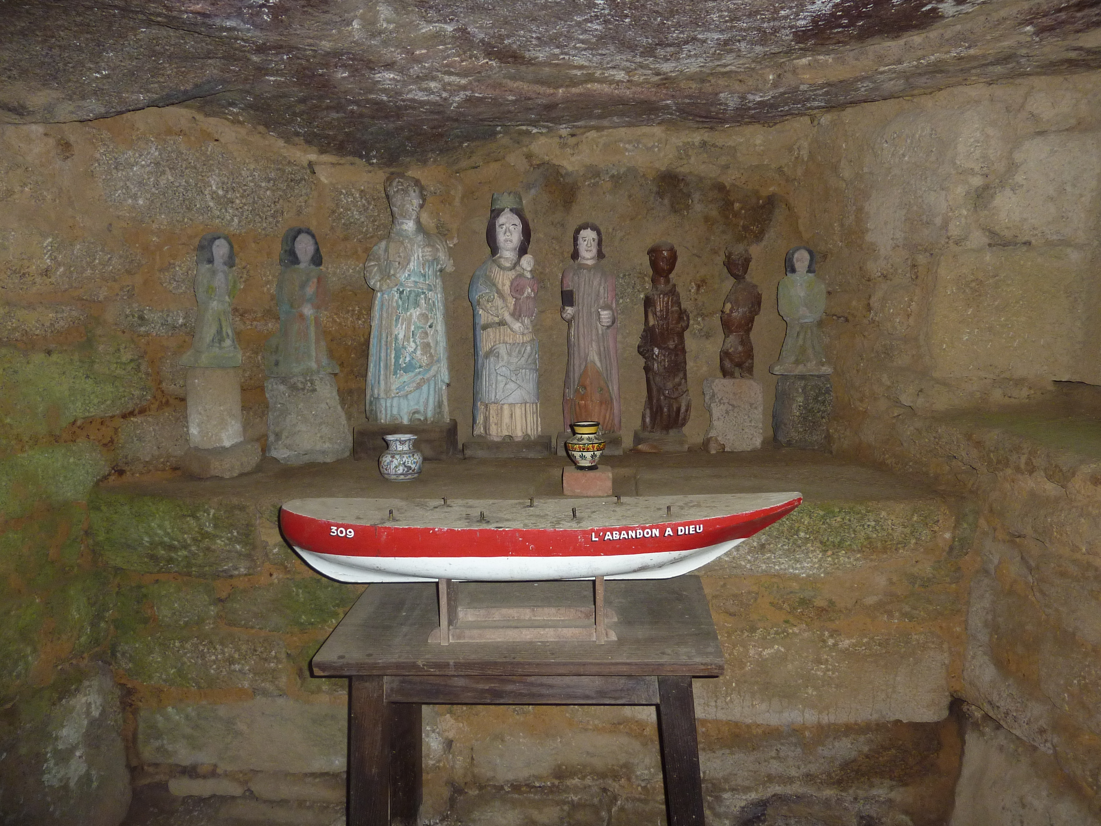 Sept-Saints (Vieux-Marché) : les anciennes statues des sept Dormants d'Ephèse dans la crypte ; le bateau a été offert par Louis Massignon